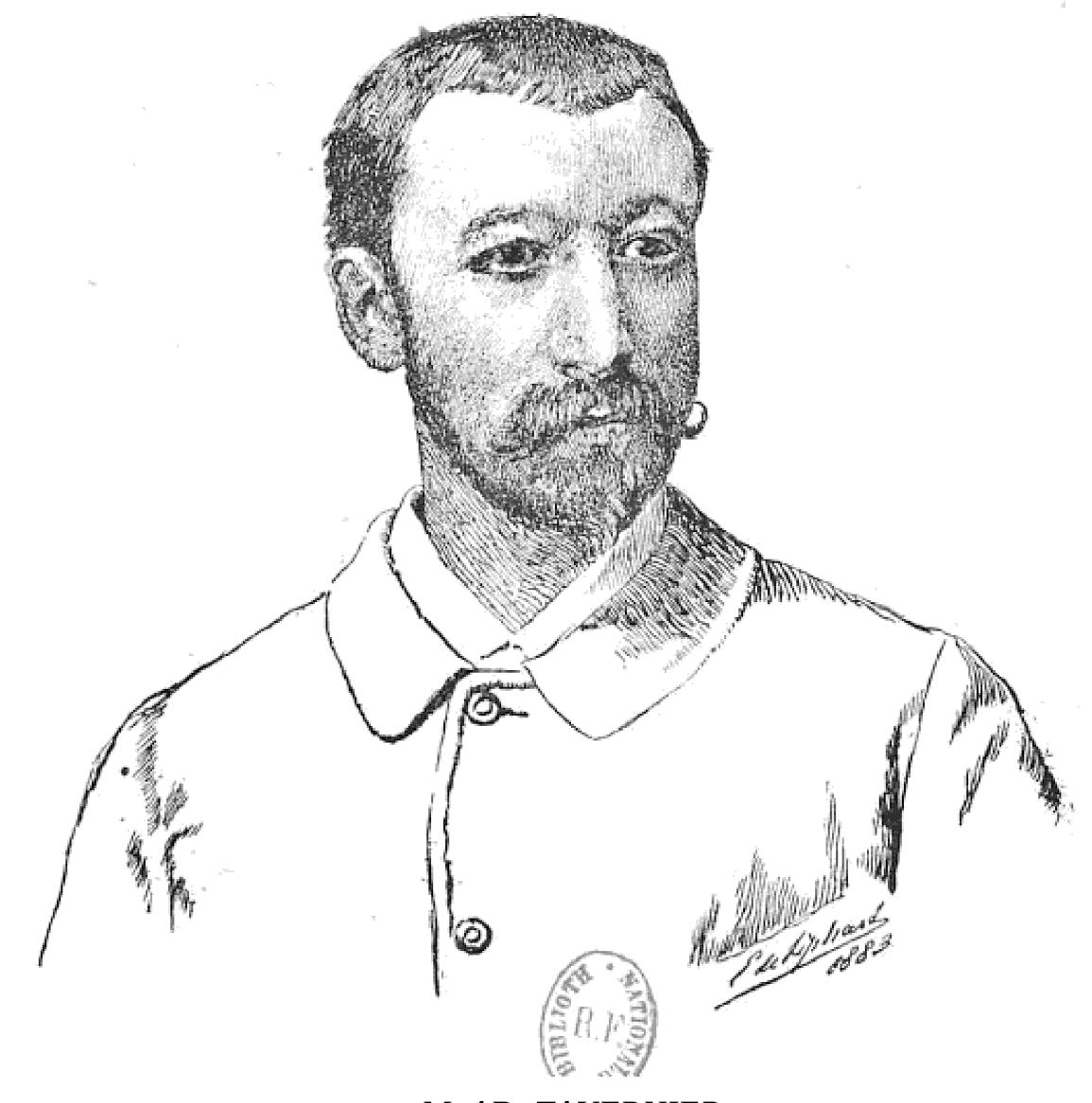 Adolphe Tavernier 1883